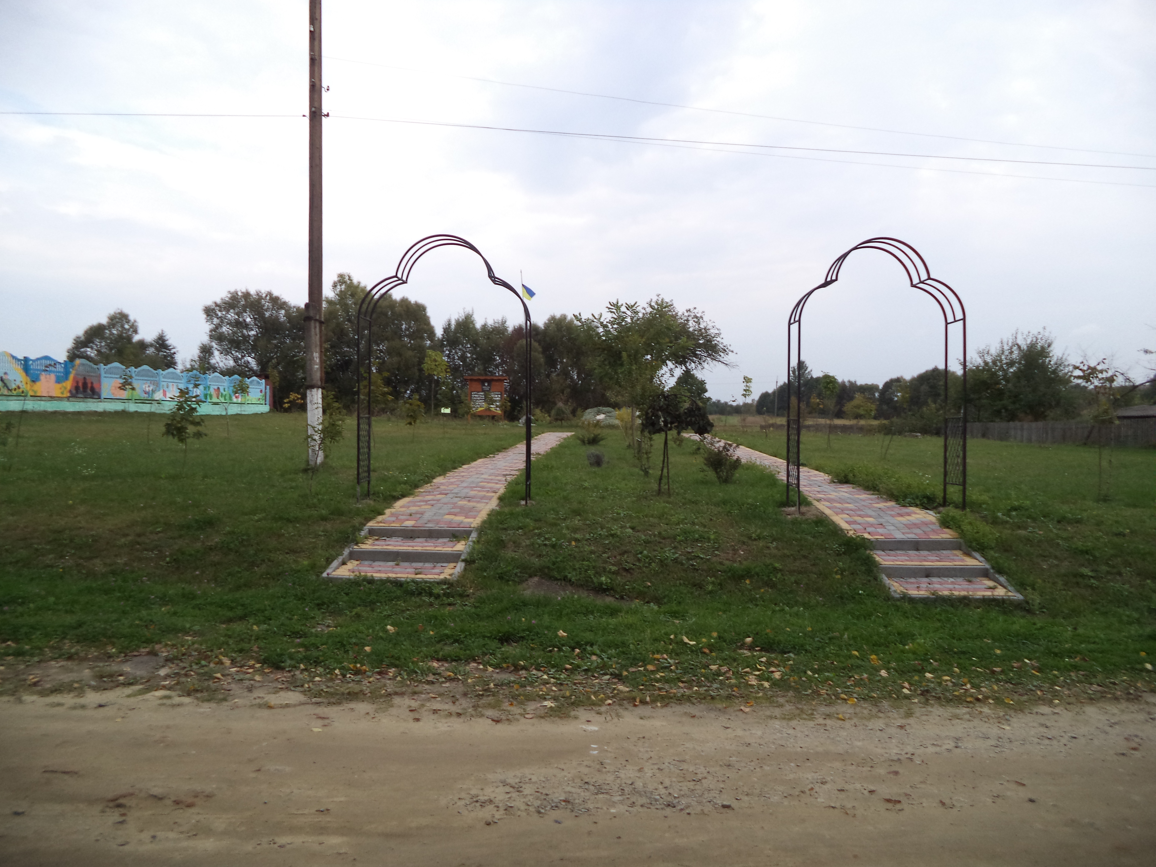 Вид спереду